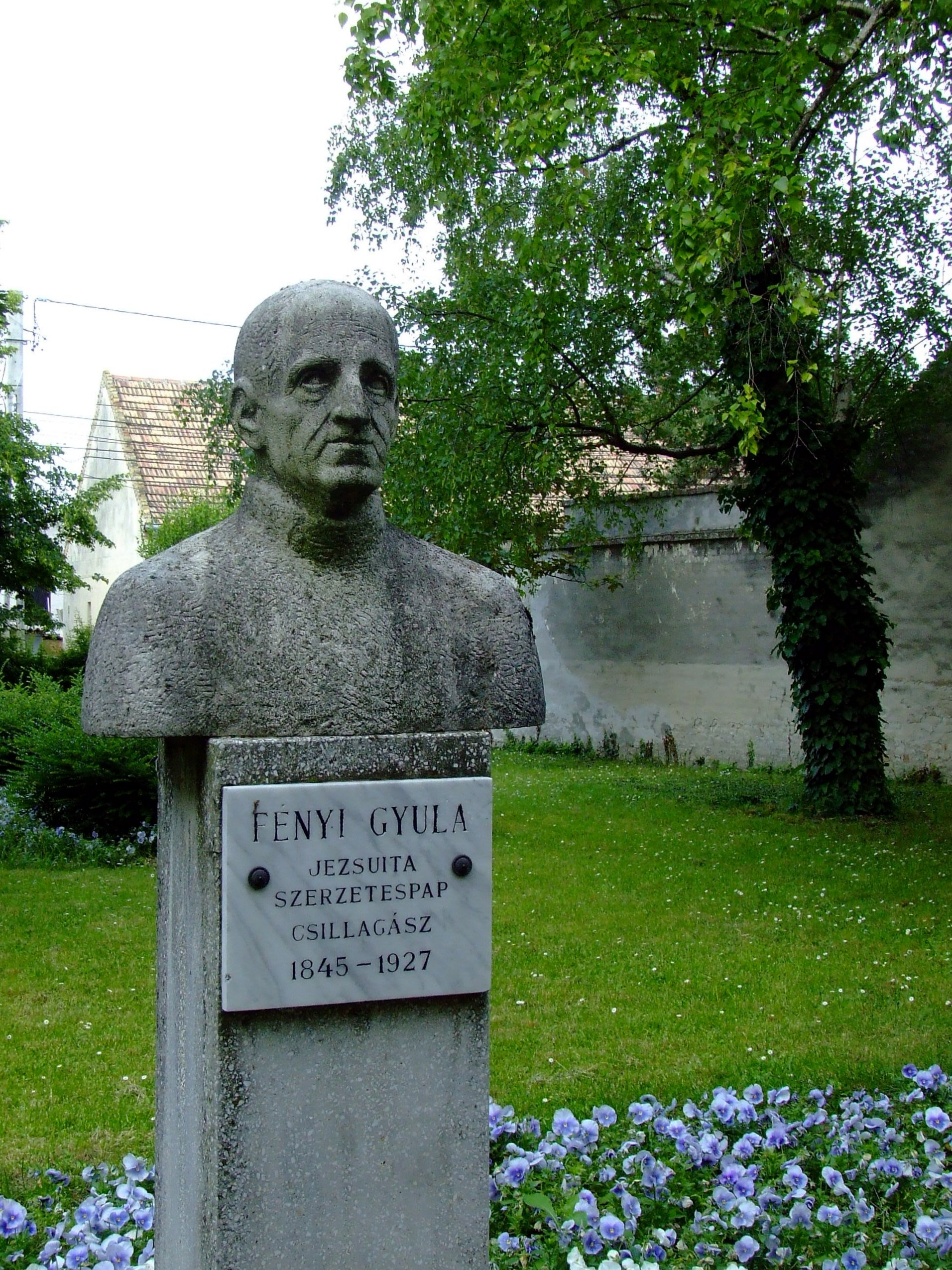 Fényi Gyula mellszobra Kalocsán. Szabó Gábor (*1940) szobrászművész alkotása